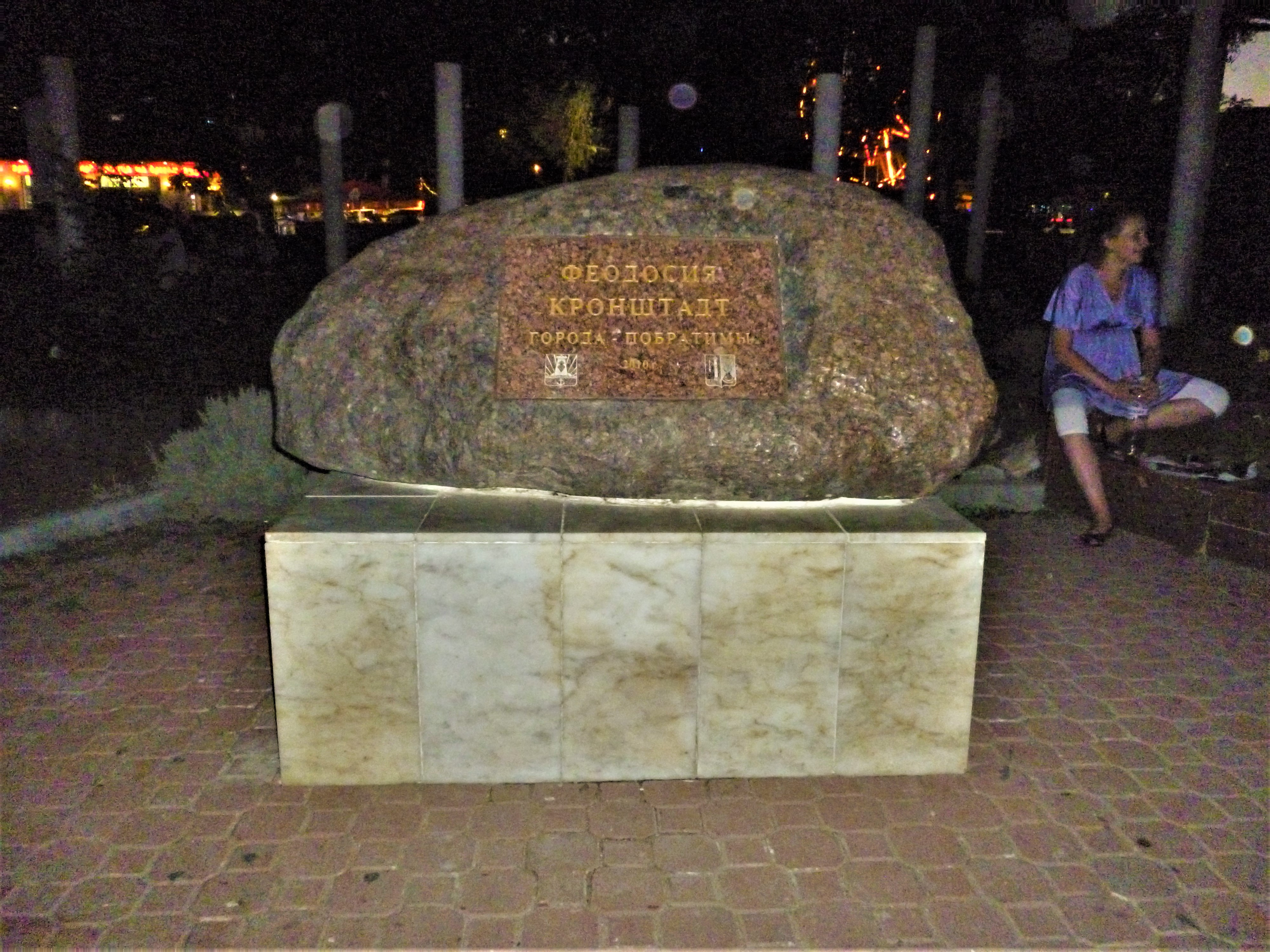 Монумент-валун, знак побратимских отношений между Кронштадтом (Россия) и Феодосией (Украина).